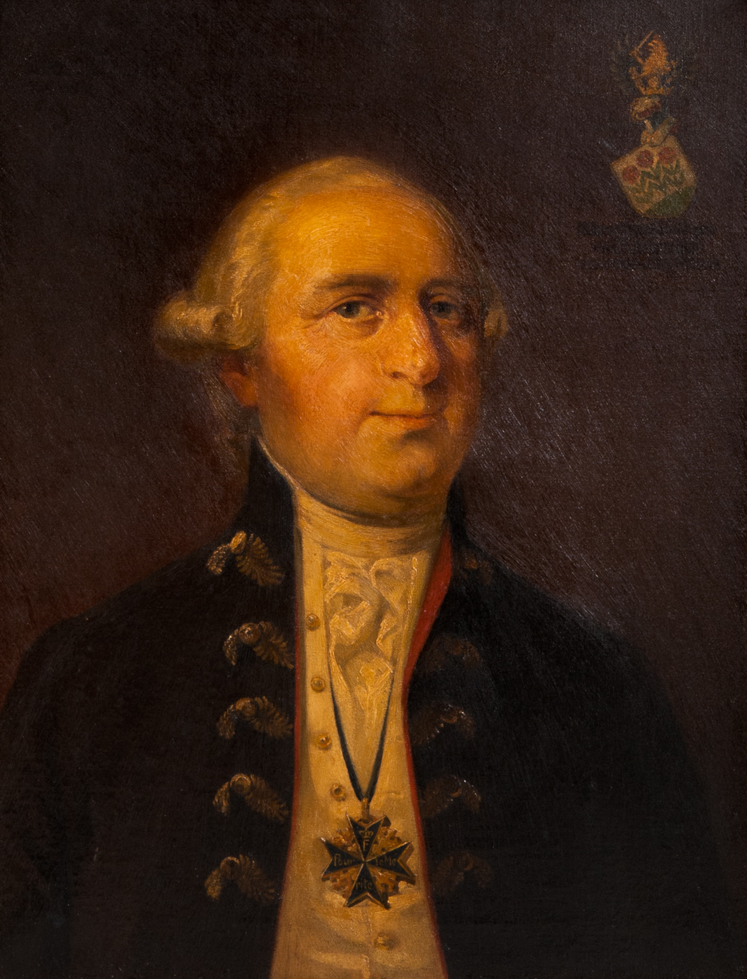 königlich-preussischer Generalmajor Johann August von Eckenbrecher (* 7. Oktober 1743 in Berlin; † 8. November 1822, Öl auf Leinwand